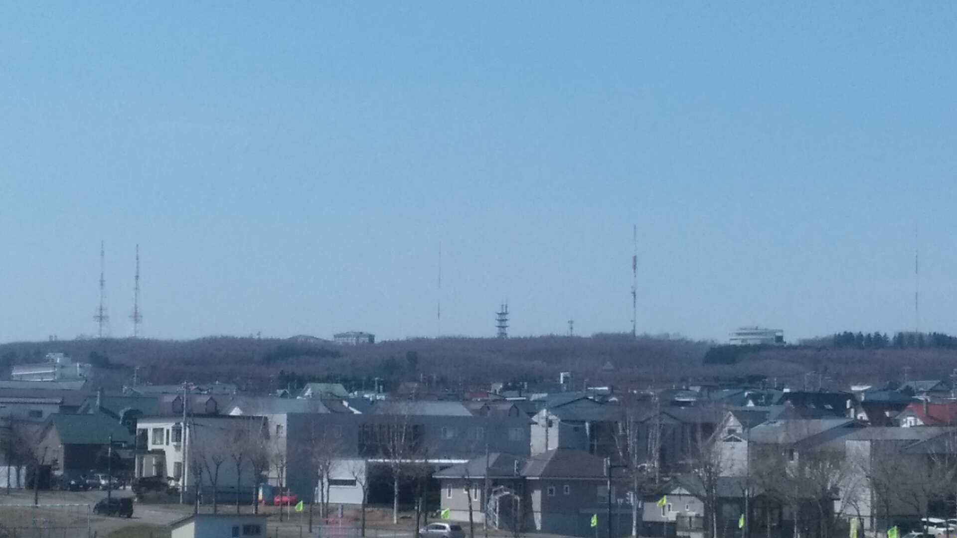 網走市天都山の鉄塔